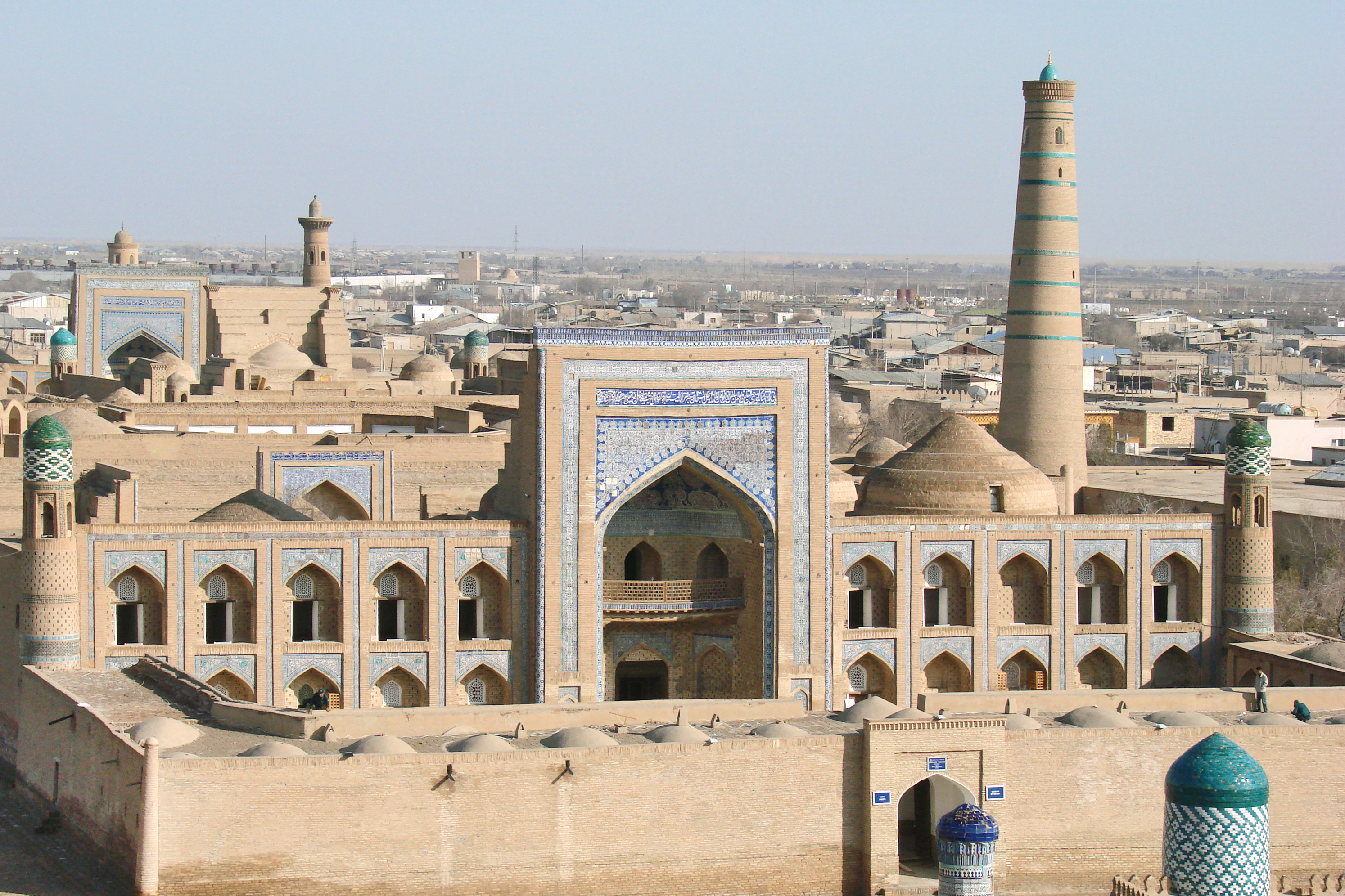 La médersa (madrasa) de Muhamad (Mohammed) Rakhim Khan (1836-1910), appelé également Ferouz ou Firuz sous son nom de poète. Sa construction date de 1871 (ou 1876 ?). Photo Annie Dalbéra prise depuis le palais Kunia Ark, sur l'Aq-Cheikh-Bobo.